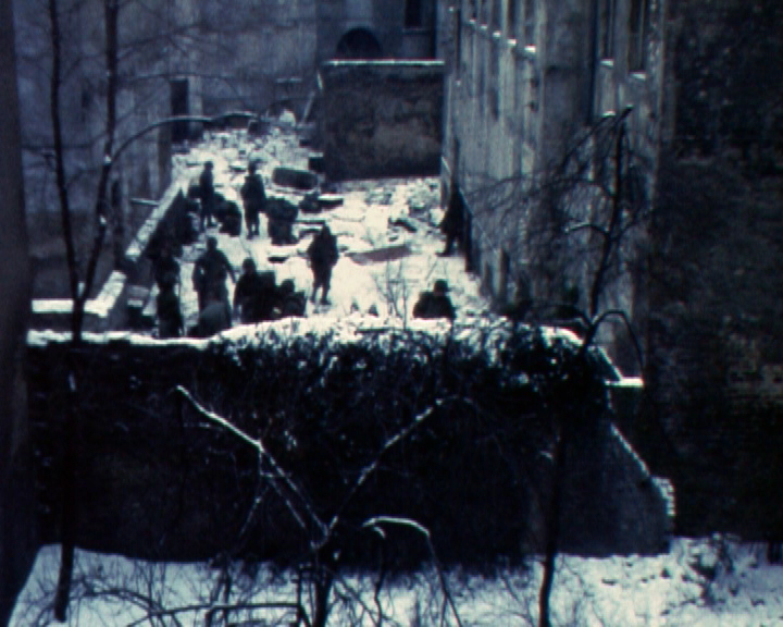 Der Block 104 bezeichnet einen Altbau-Komplex in Berlin-Kreuzberg. Training US-Army 1980. Der Häuserblock wurde bis 1981 zur Hälfte zerstört, der Rest blieb durch die Hausbesetzer-Bewegung erhalten. Die Abrissfläche ist heute Park (Nähe U-Görlitzer Bahnhof).